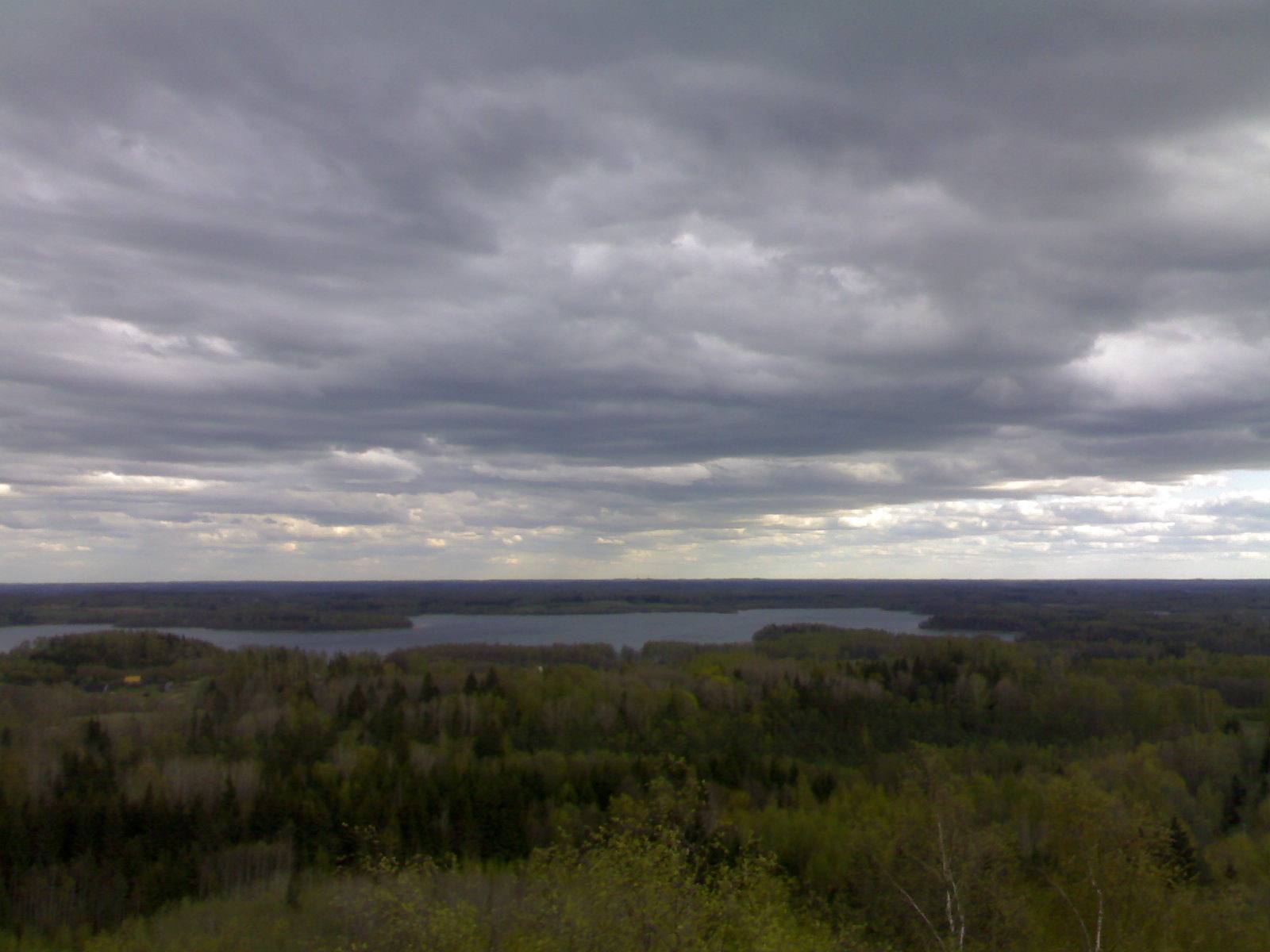 Vierins nu Eglukolna